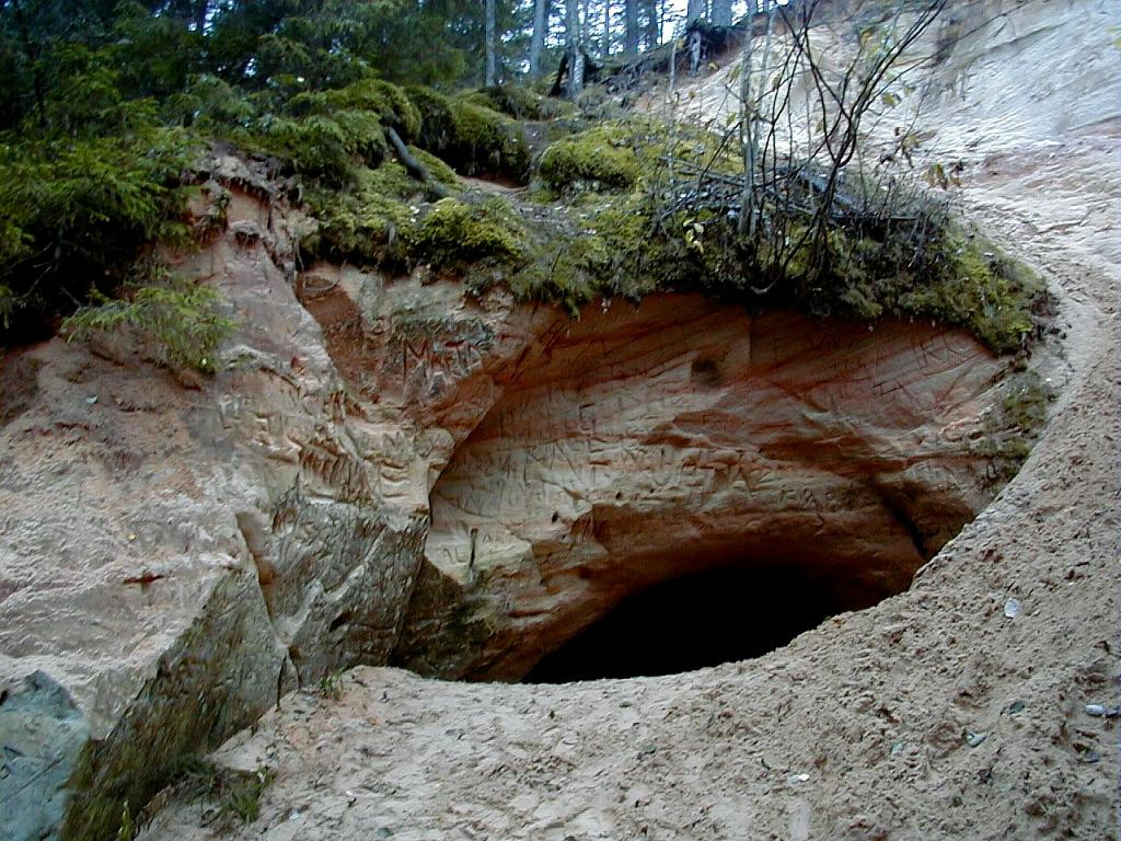 Kalēja ala 2003-10-18